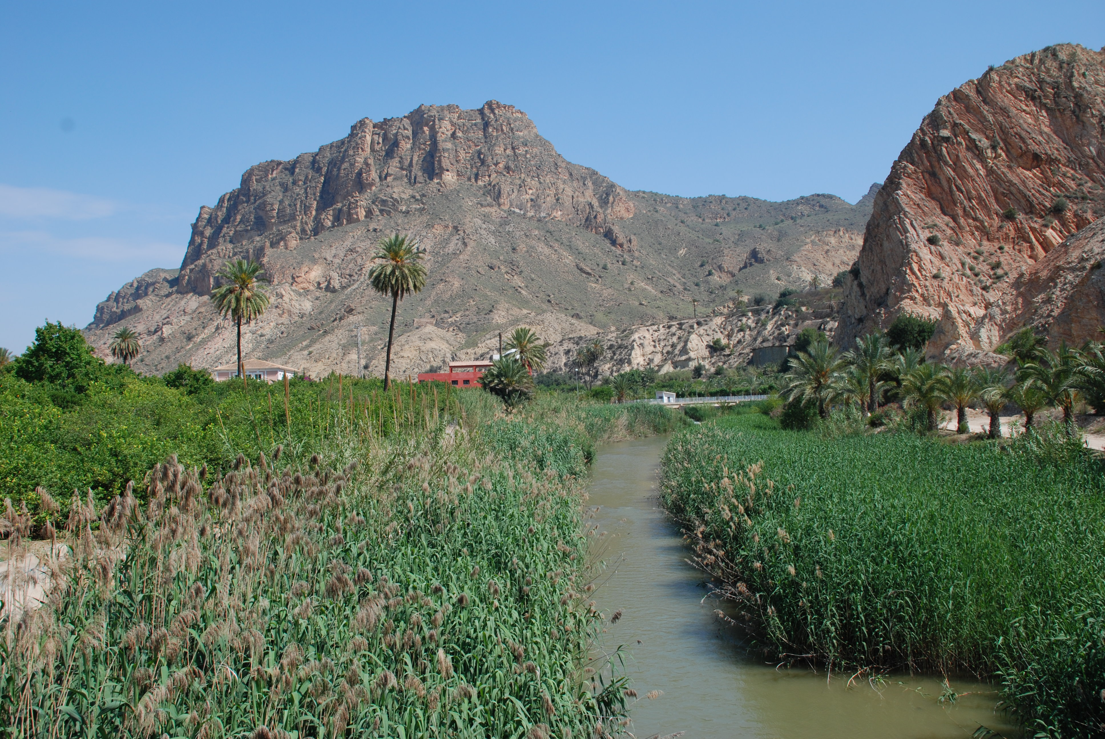 Sierra de Ricote-La Navela This is a photography of a Site of Community Importance in Spain with the ID: ES6200026. Natura2000 entry, EEA entry